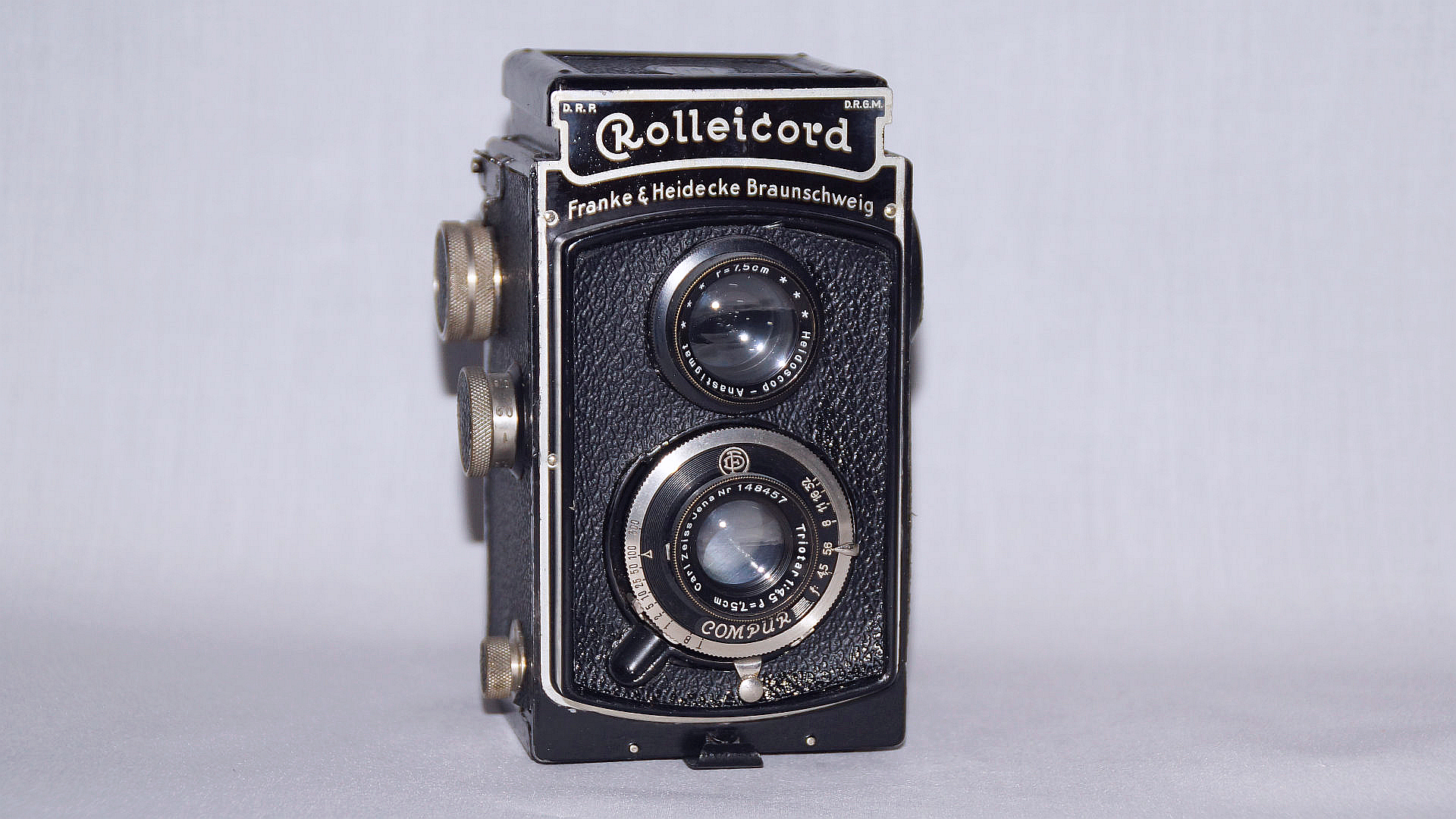 Rolleicord mit Carl Zeiss Triotar 75mm, 1:4.5, von Franke & Heidecke Braunschweig - Foto Wolfgang Pehlemann DSC04838.jpg